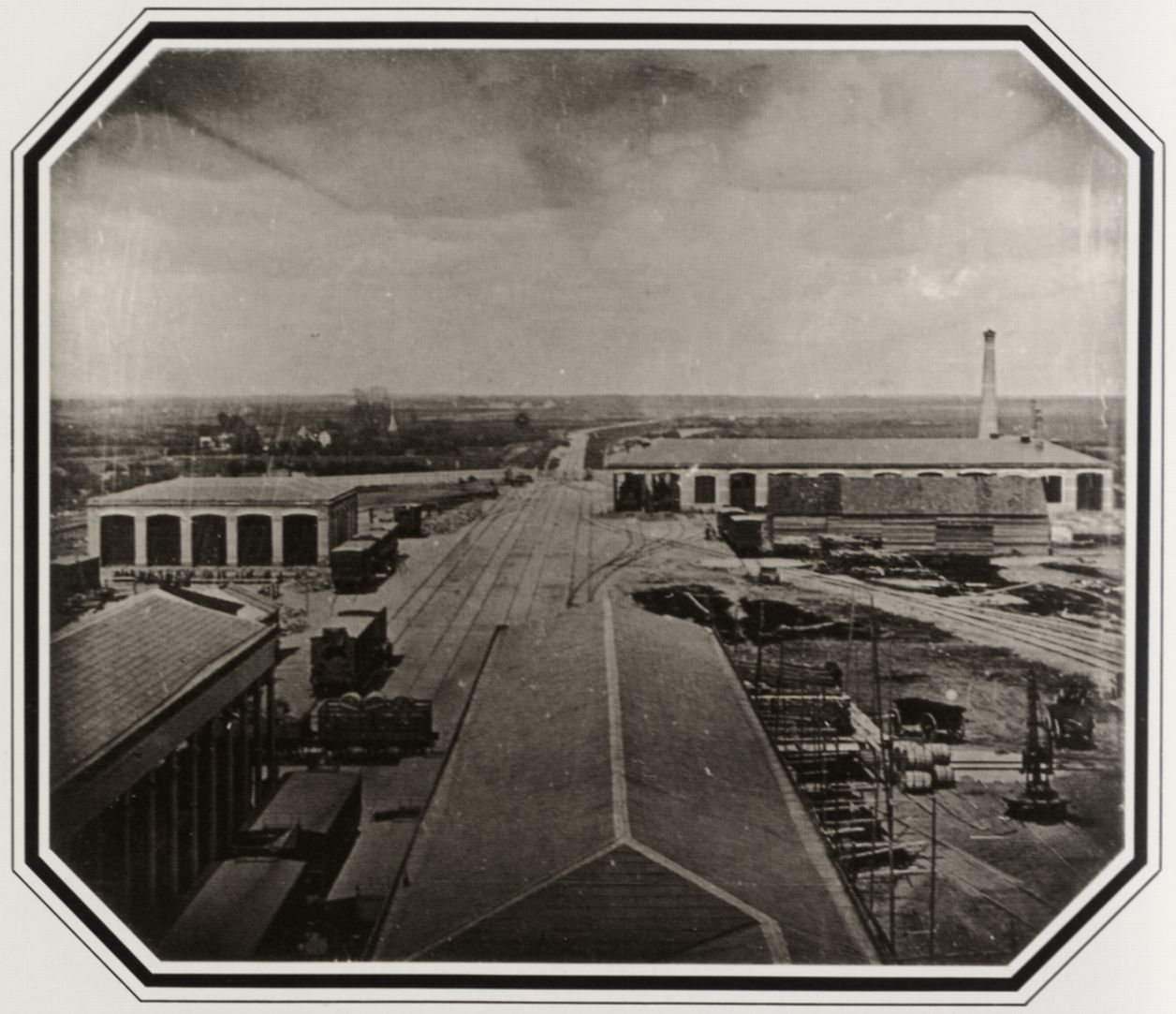 "Bahnhofsanlage der Altona-Kieler Eisenbahn" Nordelbingen Bd. 56, 1987, Uwe Steen: Anfänge der Fotografie in Schleswig-Holstein, S. 115 Rüdiger Articus: Aus der Frühgeschichte der Photographie in Altona, in Schriften der Schleswig-Holsteinischen Landesbibliothek, Bd. 18, Heide/Holst. 1994. S. 52−59, (online).